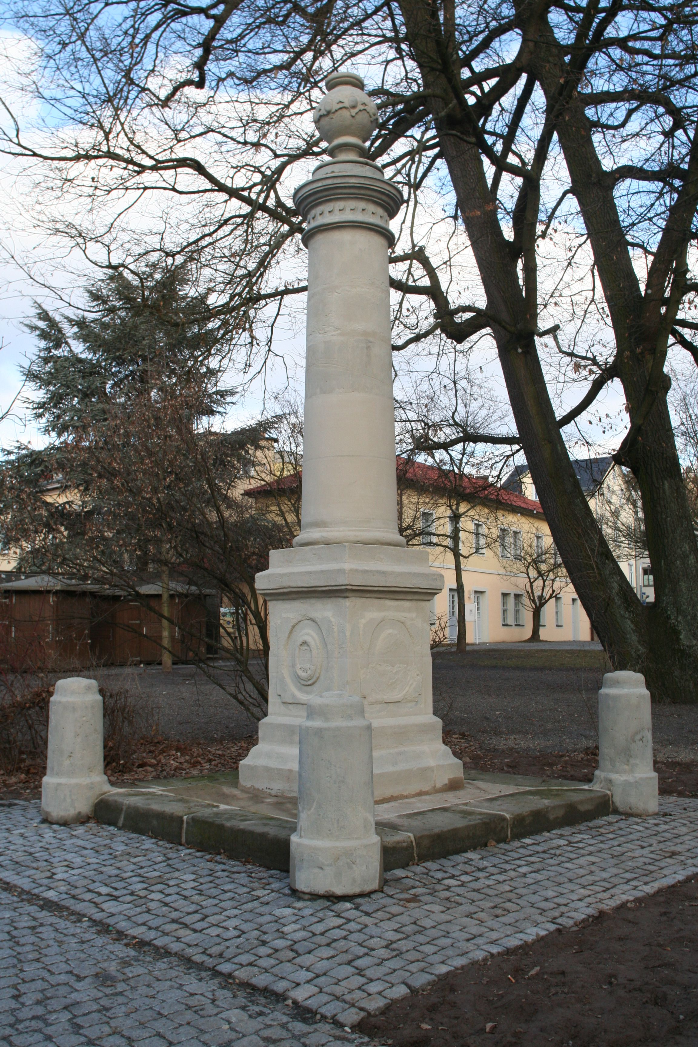 Brunnensäule, klassizistisch, um 1800 am Bürglaßschloss in Coburg